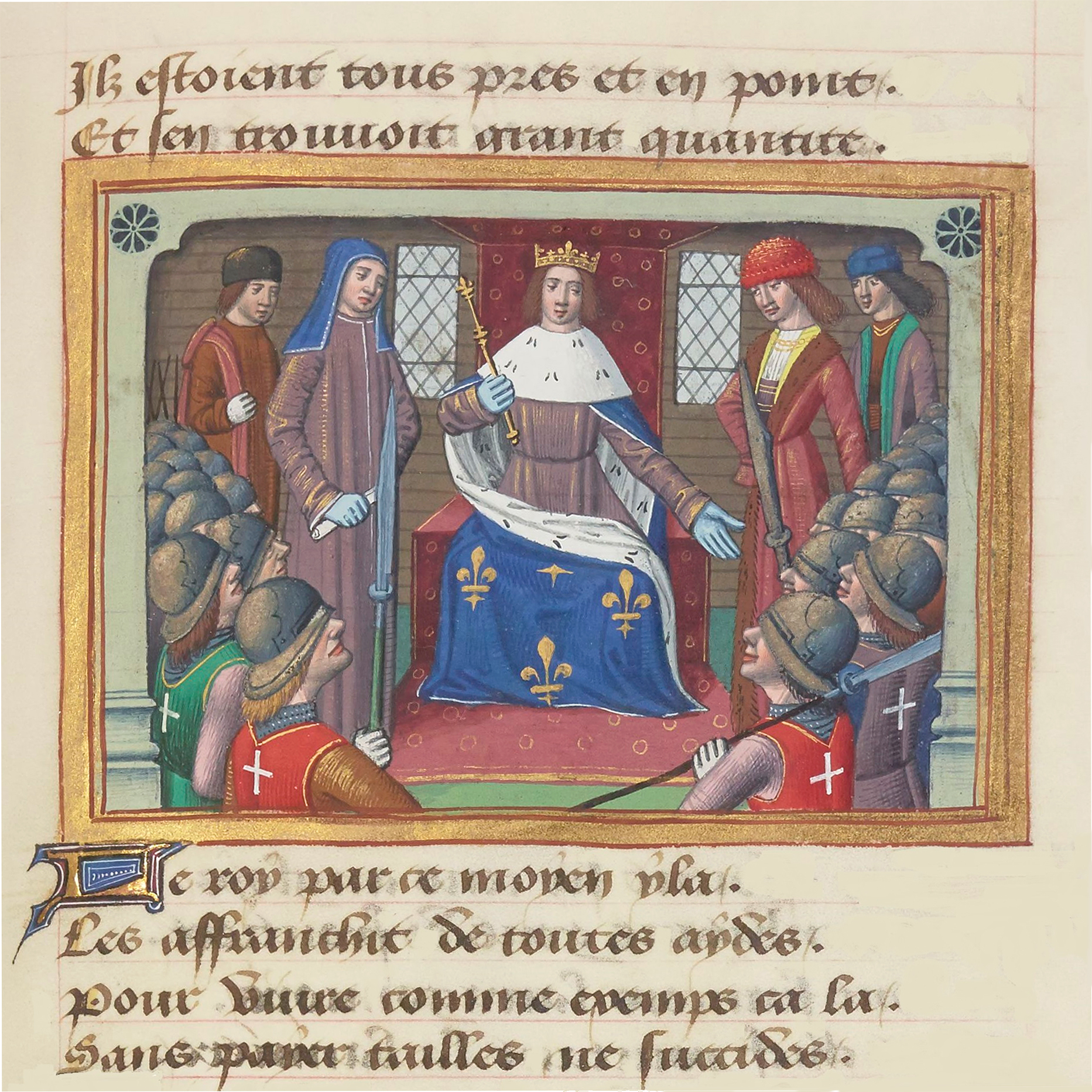 La création des francs-archers par le roi Charles VII.